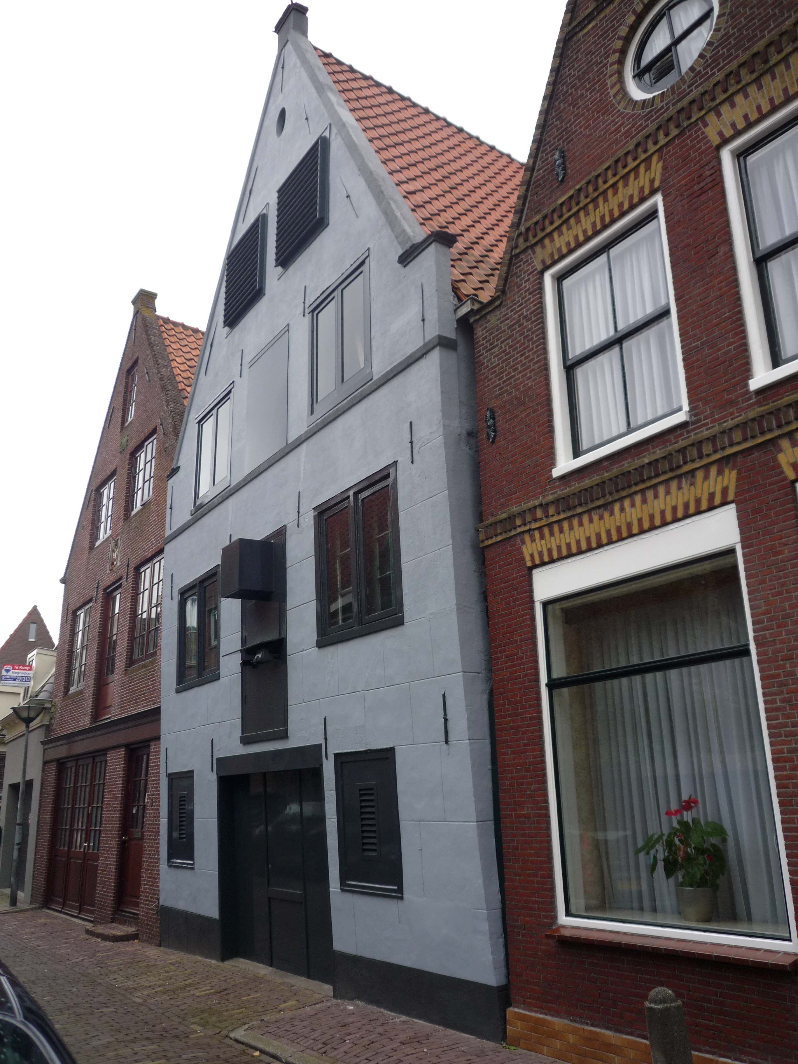 Voormalig kaaspakhuis in de Lindestraat in Hoorn